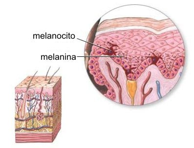 Melanocitos na pel